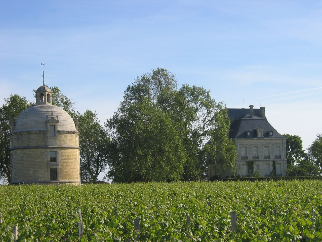 Le château Latour à Pauillac, Gironde, France